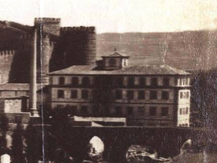 Vista general de Ávila.